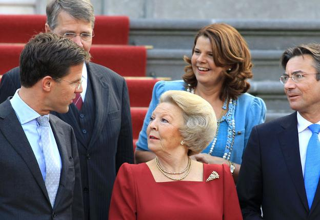 Fragment van de bordesscène bij het aantreden van het kabinet Rutte. Vooraan van links naar rechts: premier Mark Rutte, koningin Beatrix, minister van economische zaken Maxime Verhagen. Daarachter: minister van binnenlandse zaken Piet Hein Donner, minister van onderwijs Marja van Bijsterveldt